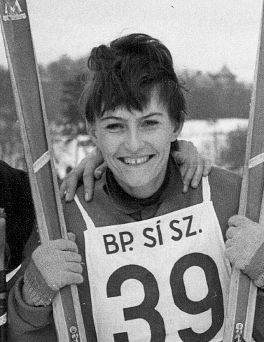 Balázs Éva